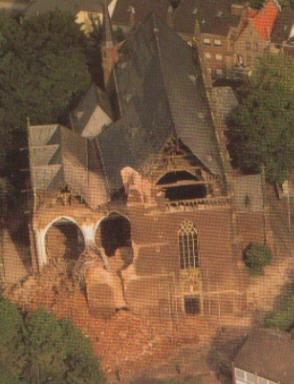 St. Maria-Magdalena Kirche in Goch unmittelbar nach dem Turmeinsturz, am 24. Mai 1993. Sonstiges: Die Lizenz wurde am 22. April 2006 durch Herrn Dr. Frankewitz erteilt.